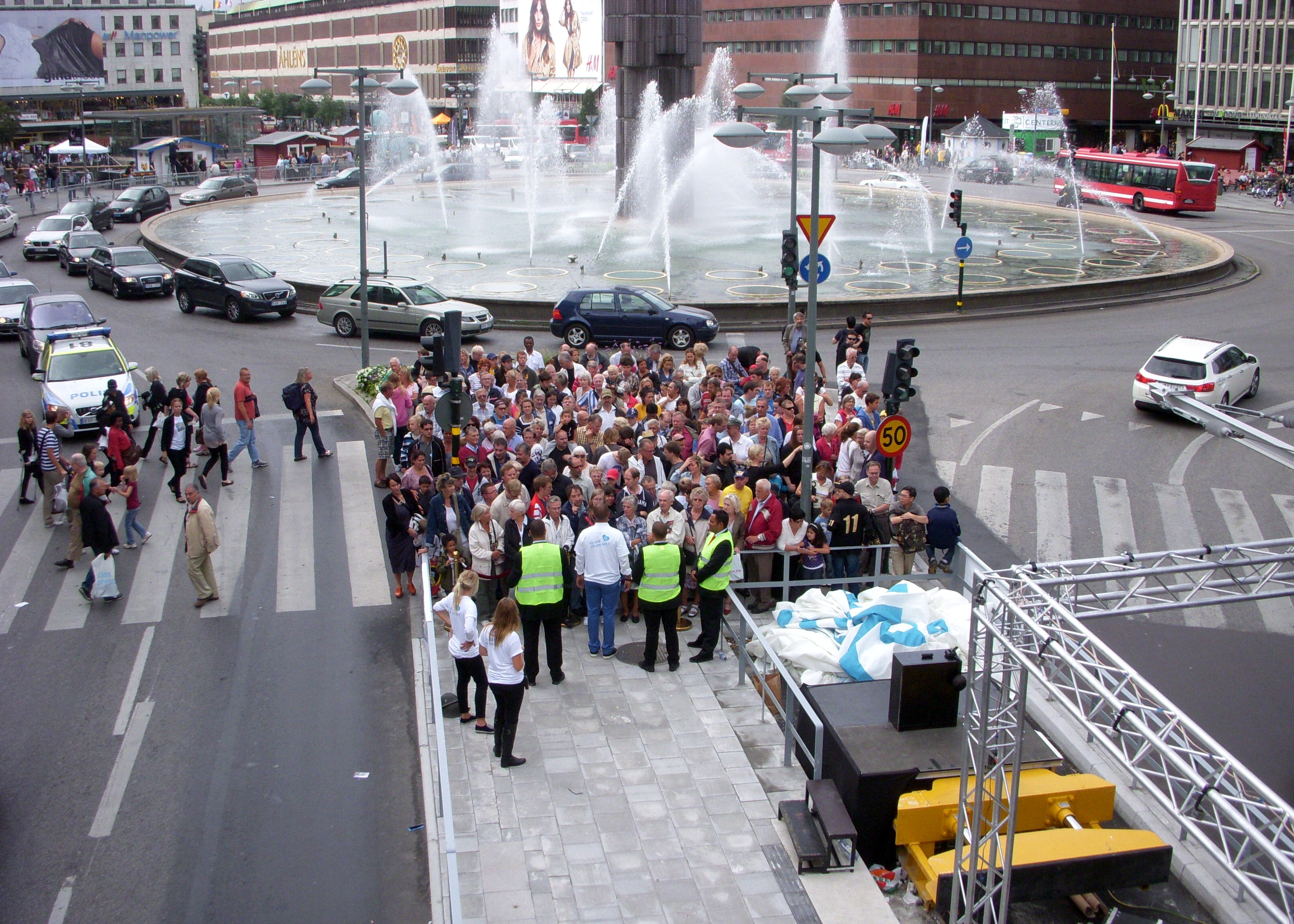 Spårväg City på Hamngatan i Stockholm, invigningsdagen den 21 augusti 2010, i väntan på en provtur.